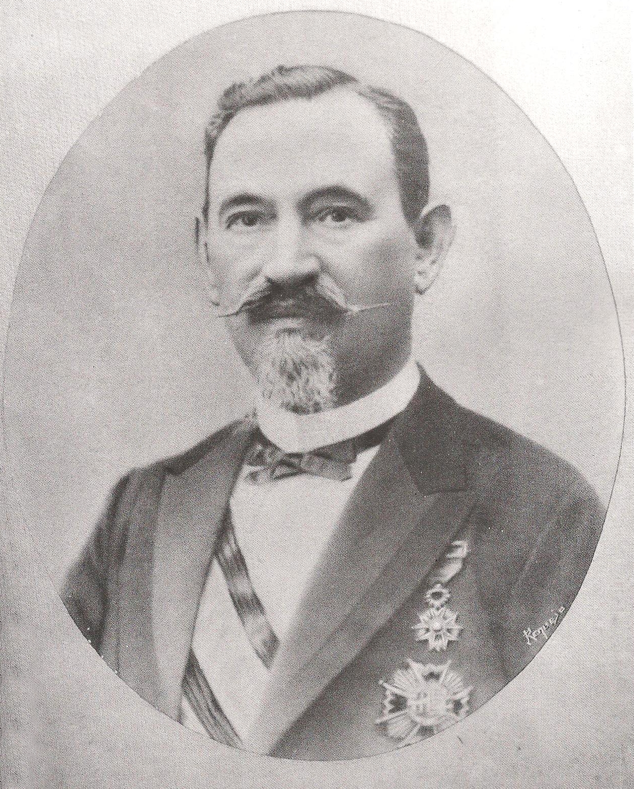 Retrato oficial de Matías López